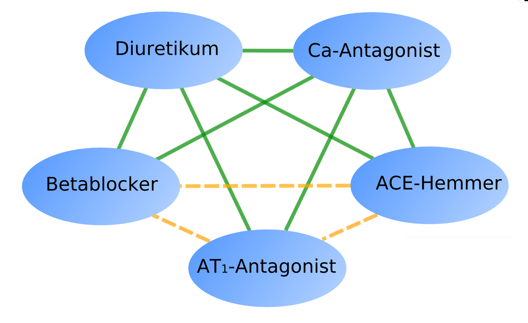 Kombinationsmöglichkeiten von antihypertensiv wirksamen Medikamenten. Grüne Linien: empfohlene Kombination, synergistische Wirkung. Gelbe Linien: mögliche Kombination.